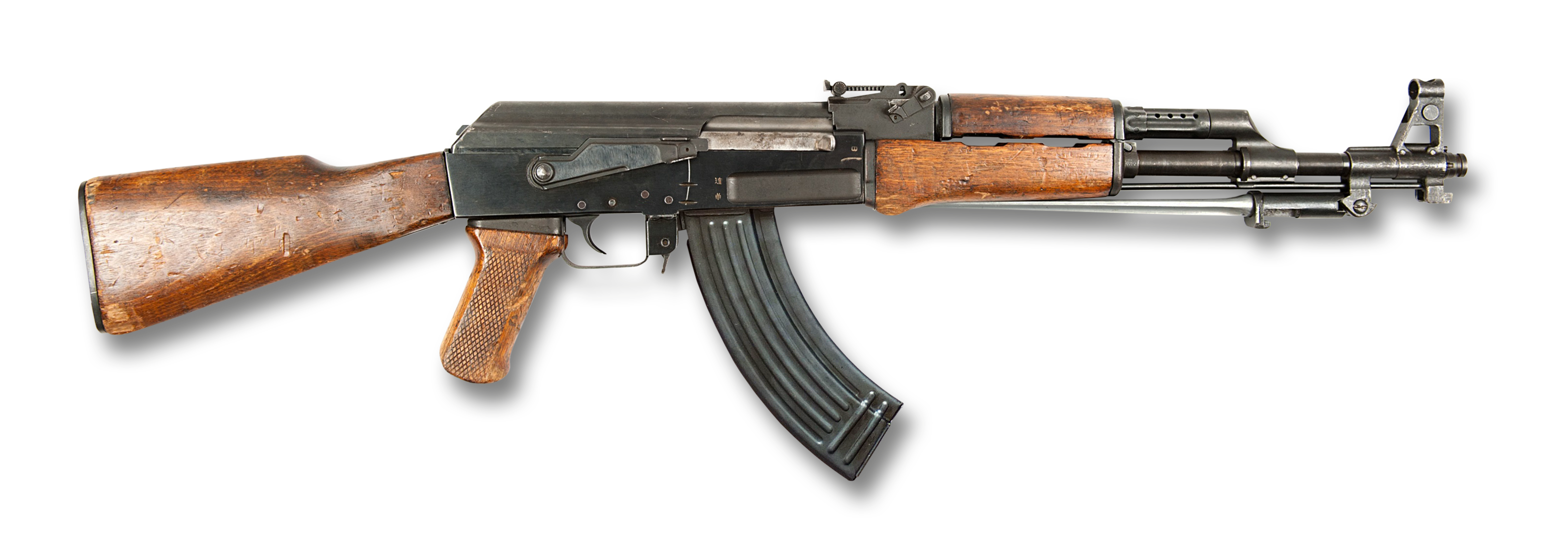 Sturmgewehr Typ 56 (China)